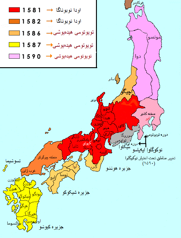 نقشه مناطق تصرف شده در ژاپن، در دوره اودا نوبوناگا و تویوتومی هیده یوشی